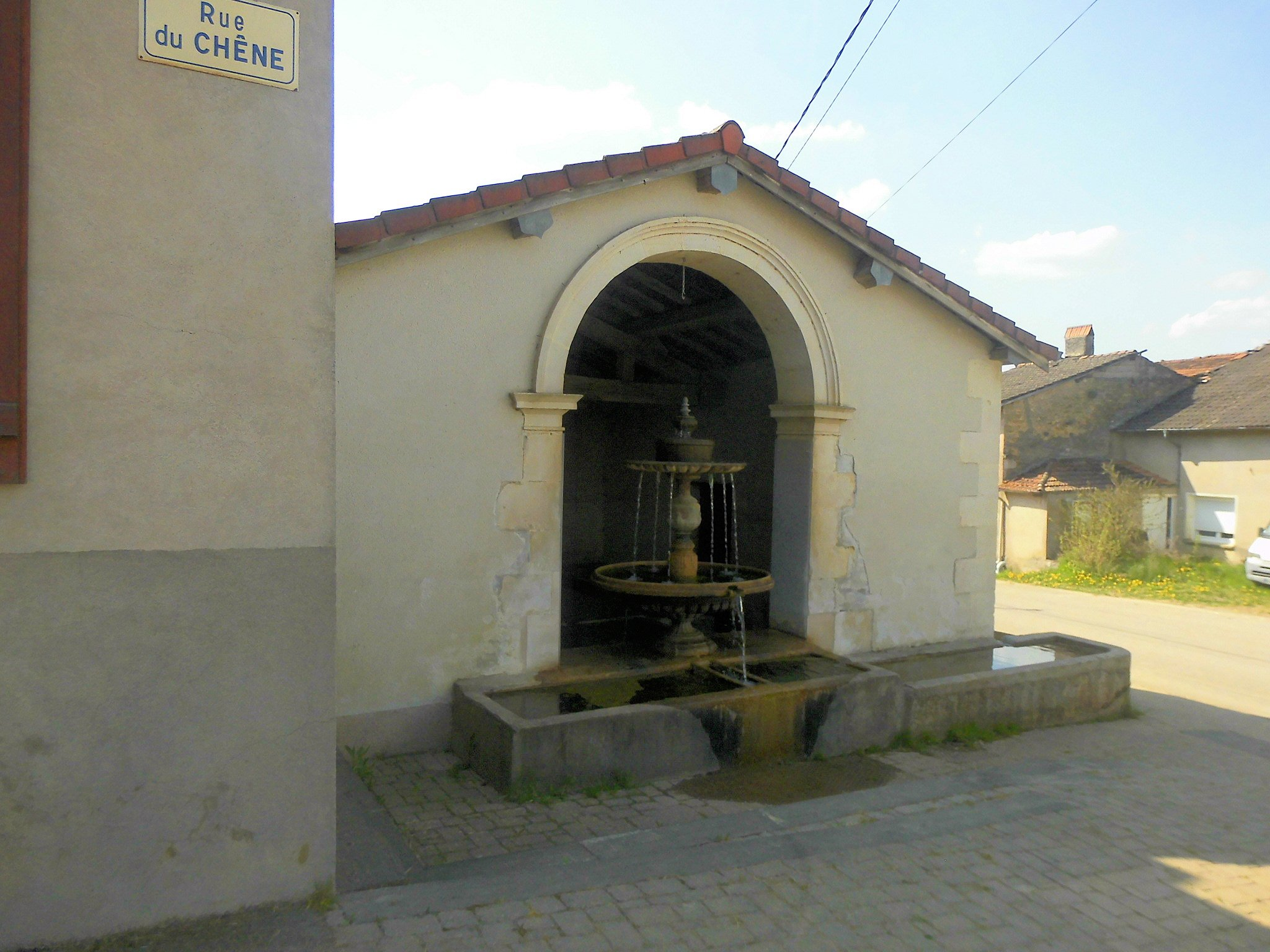 La fontaine-lavoir de Pleuvezain